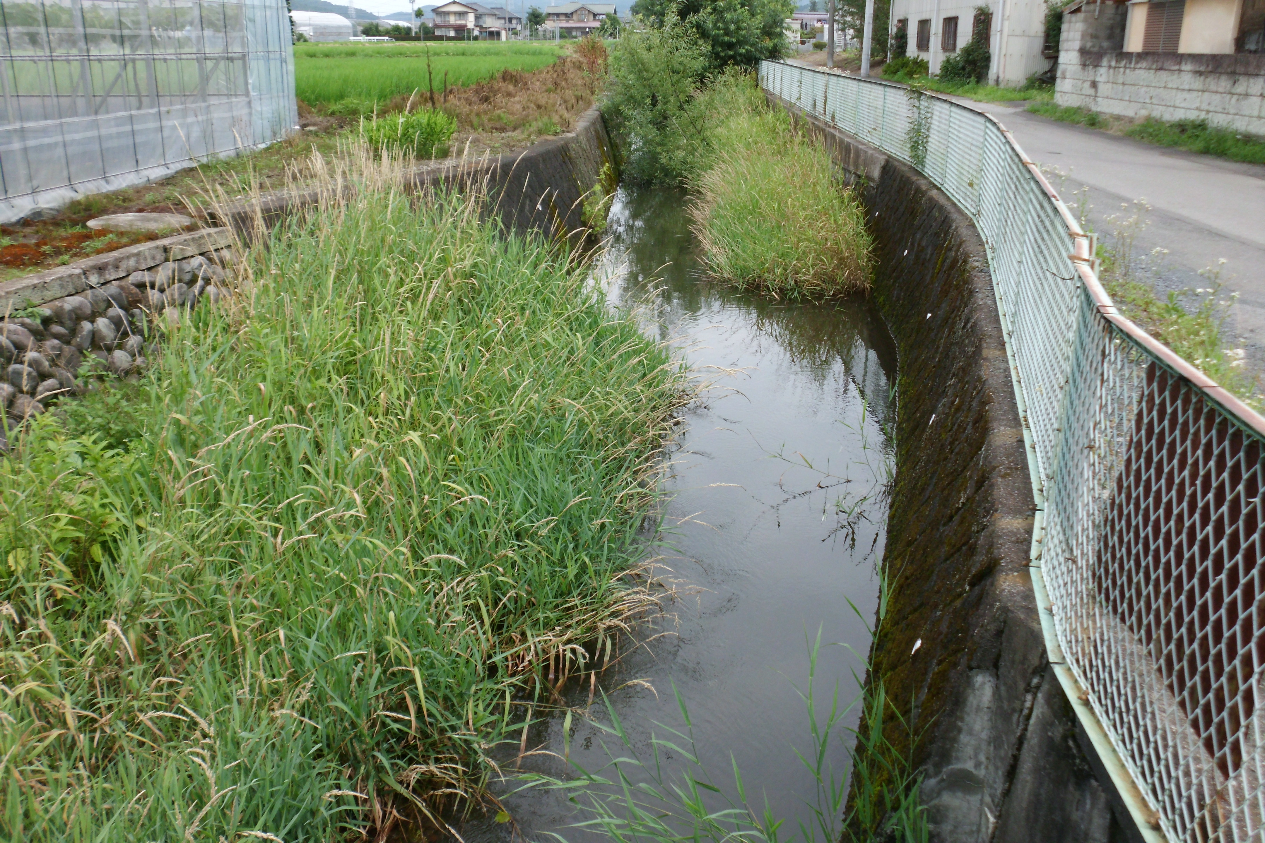 栃木県宇都宮市を流れる新川。二宮尊徳によって造られたことから二宮用水の総称もある。 東北自動車道宇都宮インターチェンジ付近を流れる、徳次郎用水と呼ばれる区間。